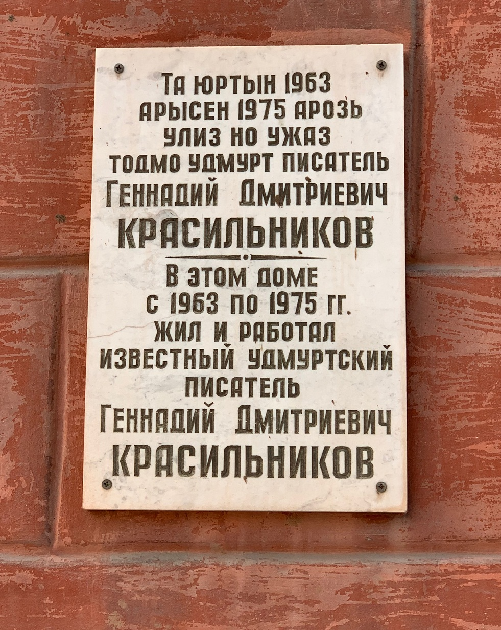 Мемориальная доска на доме 45 по улице М. Горького (Ижевск), где жил и работал удмуртский писатель Г. Д. Красильников. Краси́льников Генна́дий Дми́триевич (7 июля 1928 года, с. Алнаши Алнашского района Удмуртской АССР, — 11 апреля 1975 года, г. Ижевск) — удмуртский писатель. Лауреат Государственной премии Удмуртской АССР. Член Союза писателей СССР (1957).